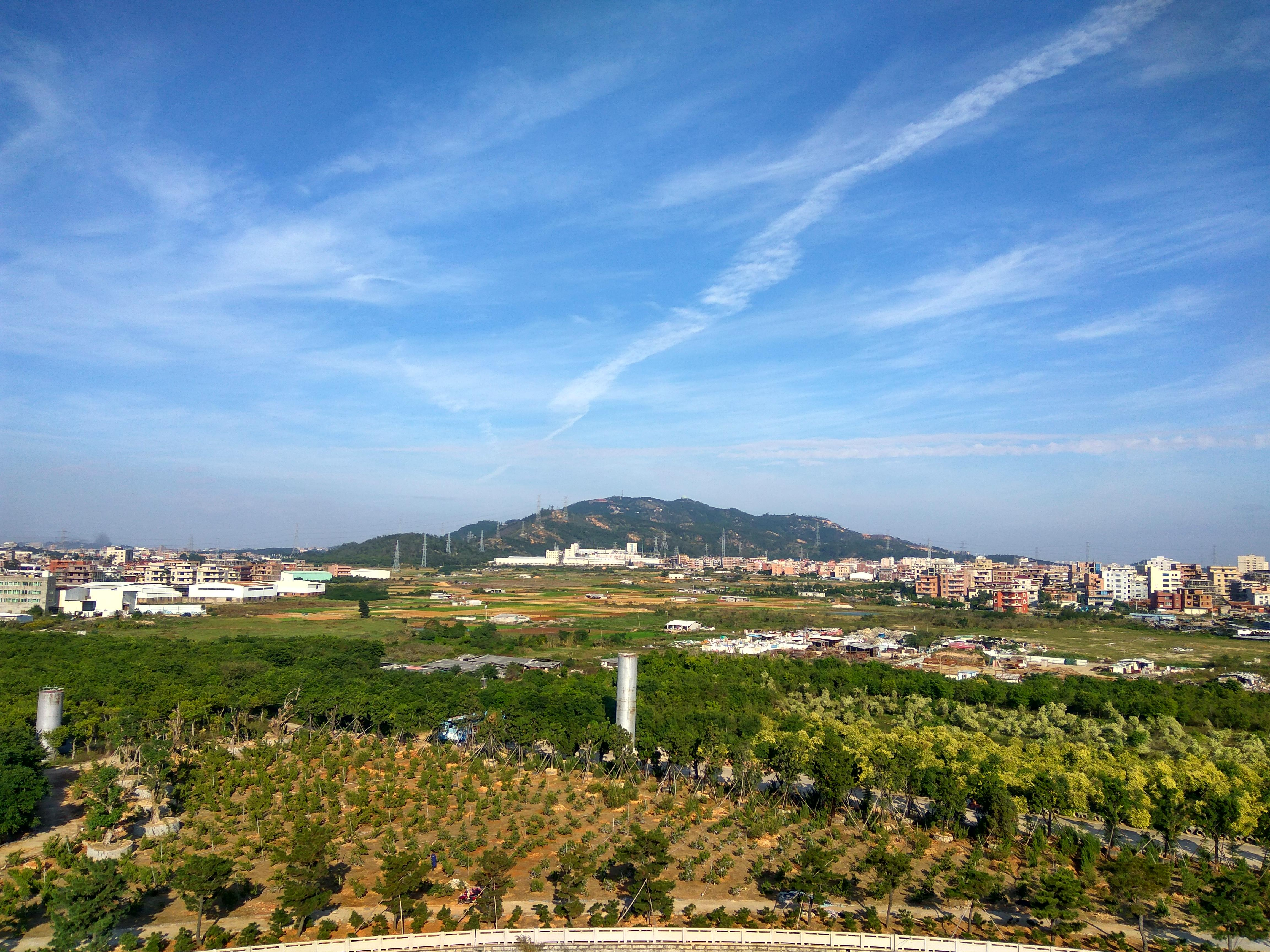 从安海镇上远眺清源山